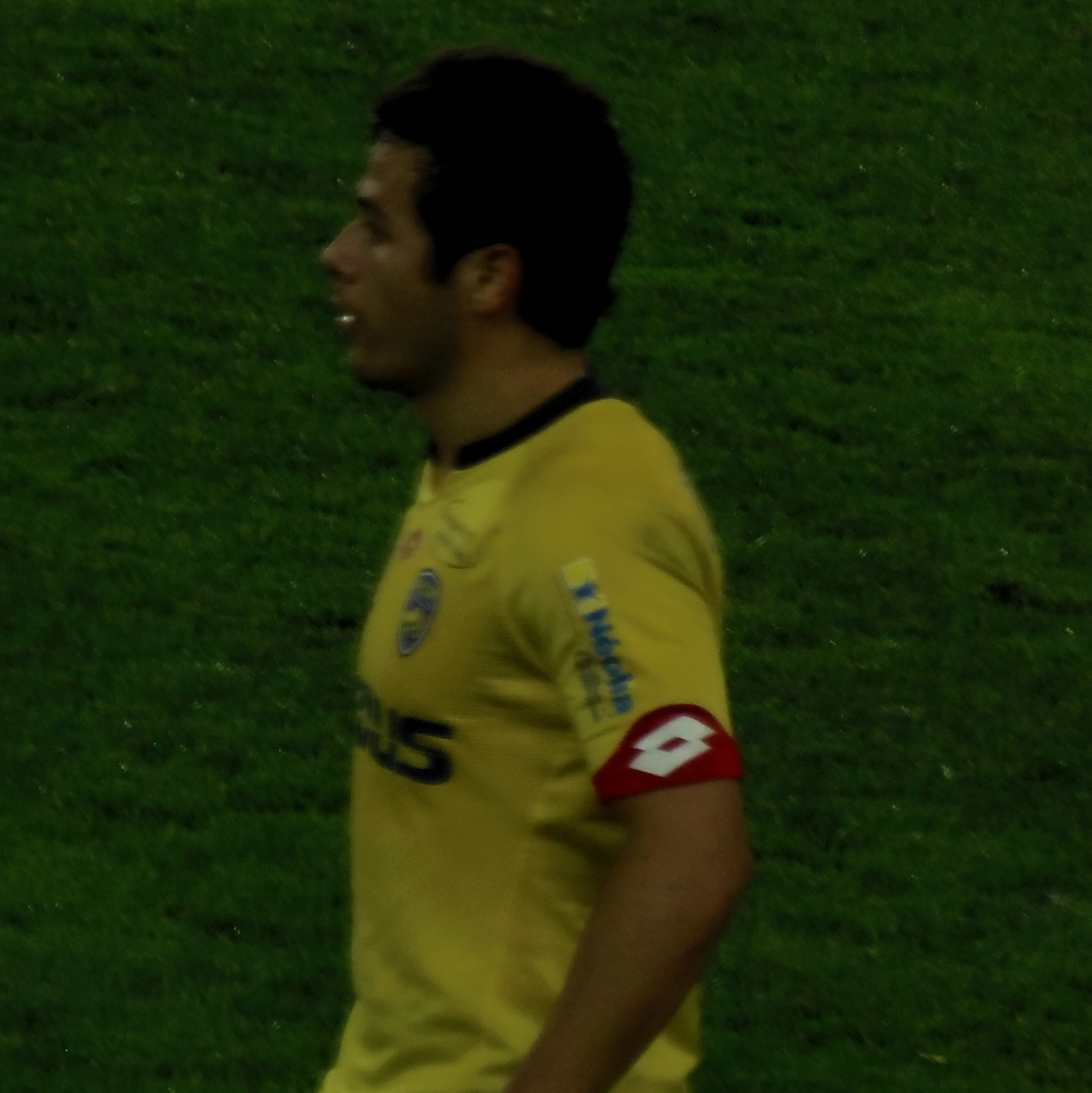 lors de Sochaux-Evian